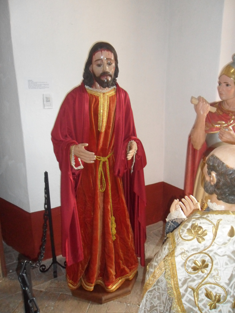 El Amo Jesús de Puelenje es una escultura de Jesucristo de talla completa y de vestir de estilo barroco, encarnada, hecha en madera policromada del siglo XVIII de la escuela quiteña venerada desde el siglo XVIII en el templo de Puelenje, aquí se muestra en la Exposición de arte procesional semana santa de Popayán.